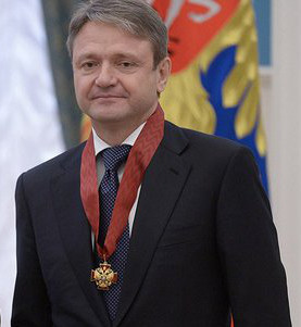 Губернатор Краснодарского края Александр Ткачёв